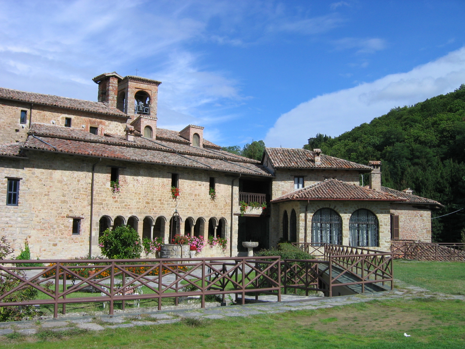 Eremo di Sant'Alberto di Butrio (Pavia), affidato agli Eremiti della Divina Provvidenza fondati da San Luigi Orione.